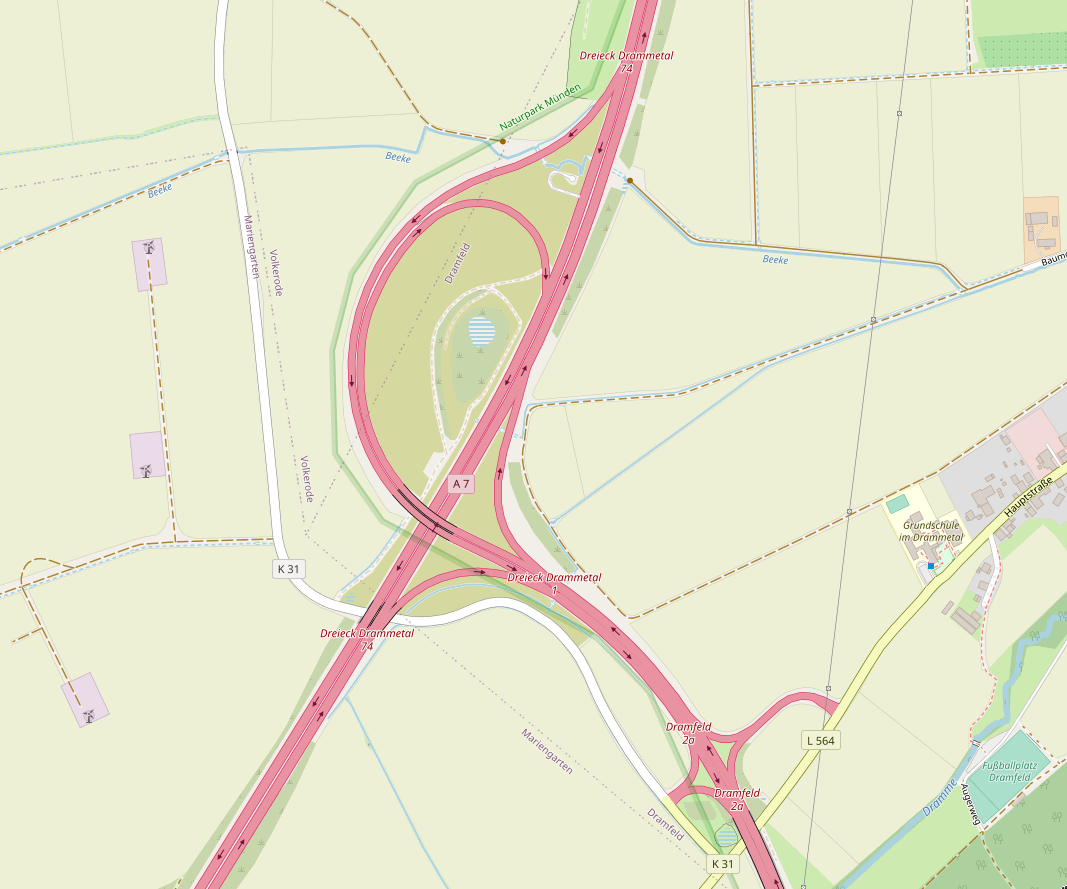 Lage des Autobahndreiecks Drammetal (A7/A38) bei Friedland.